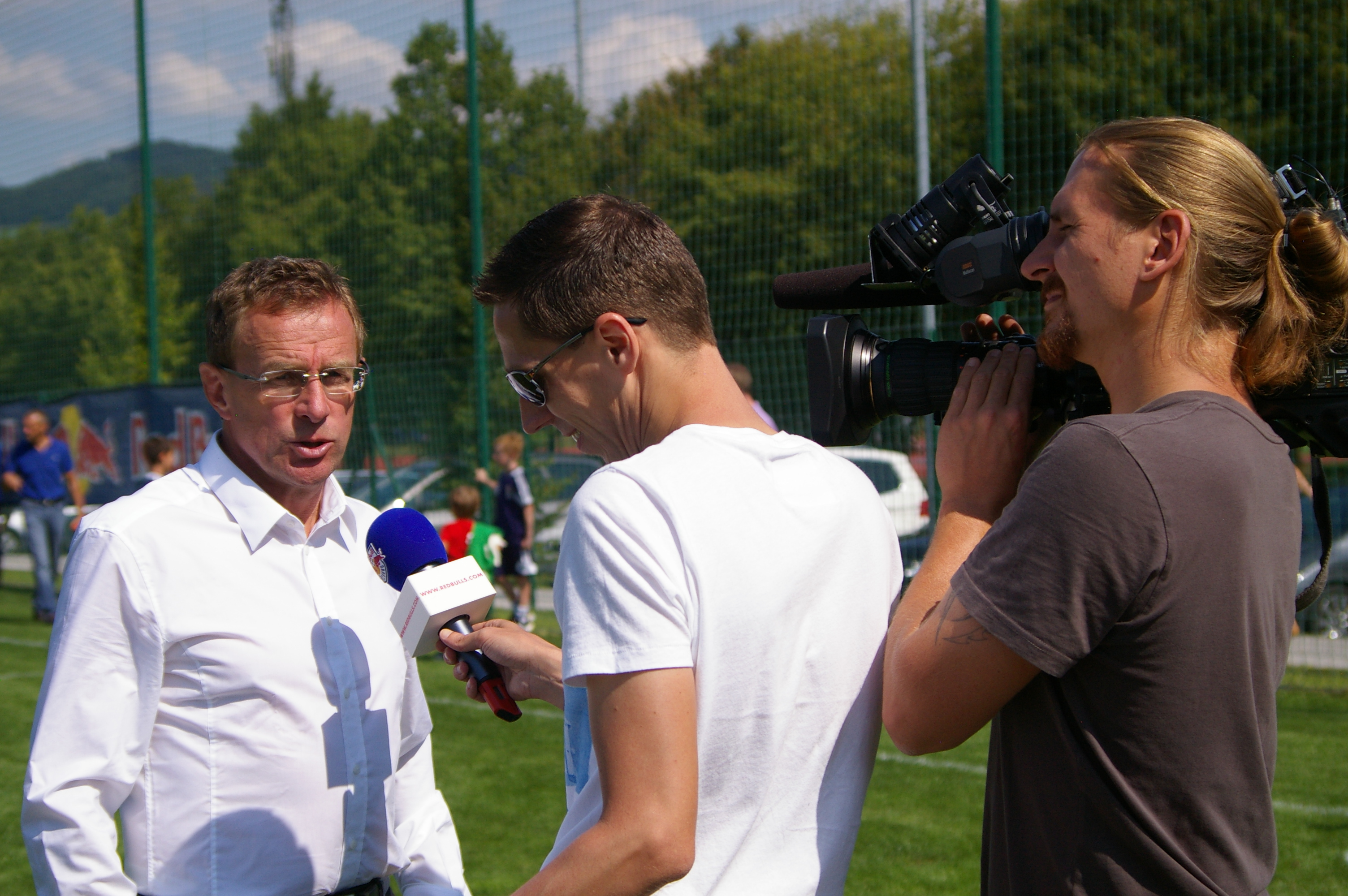 U16 Nachwuchsturnier des FC Red Bull Salzburg